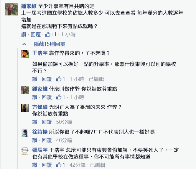 王浩宇市議員於臉書的發言